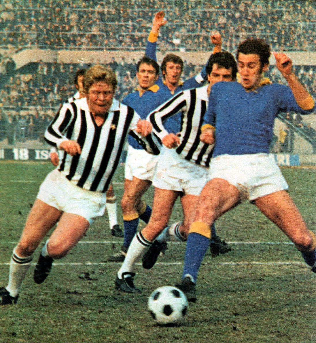 Torino, stadio Comunale, 14 febbraio 1971. Il bianconero Helmut Haller (a sinistra) alle prese con un avversario gialloblu nella sfida Juventus – Verona (2-1) valevole per la 18ª giornata del campionato italiano di Serie A 1970-71; in secondo piano, l'altro juventino Roberto Bettega.